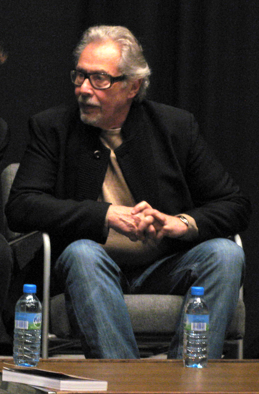 Mark Rydell, à Amiens (Somme, France) - De passage à la "Maison de la Culture" lors du « 28ème Festival international du film d'Amiens ». .